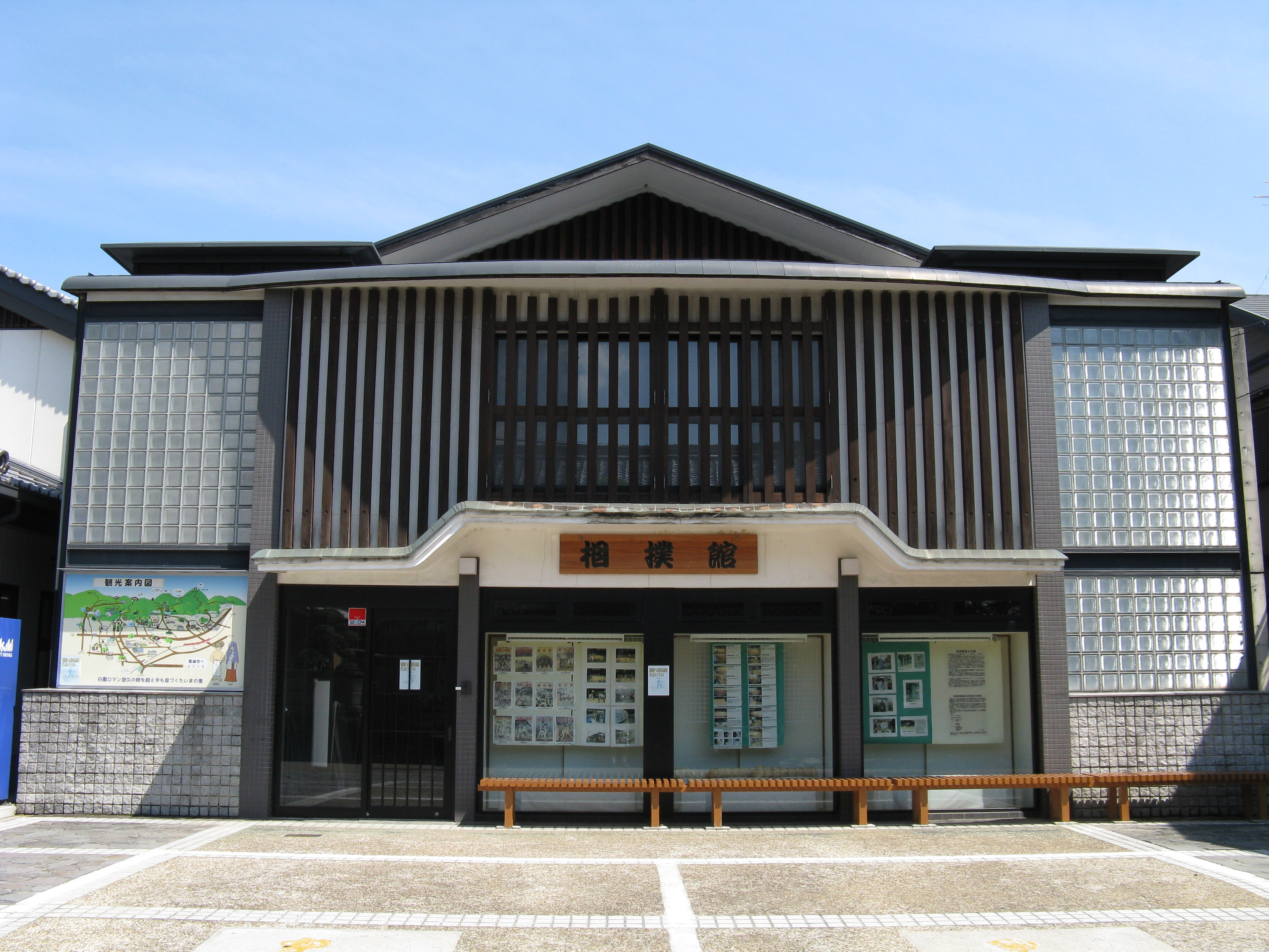 葛城市相撲館